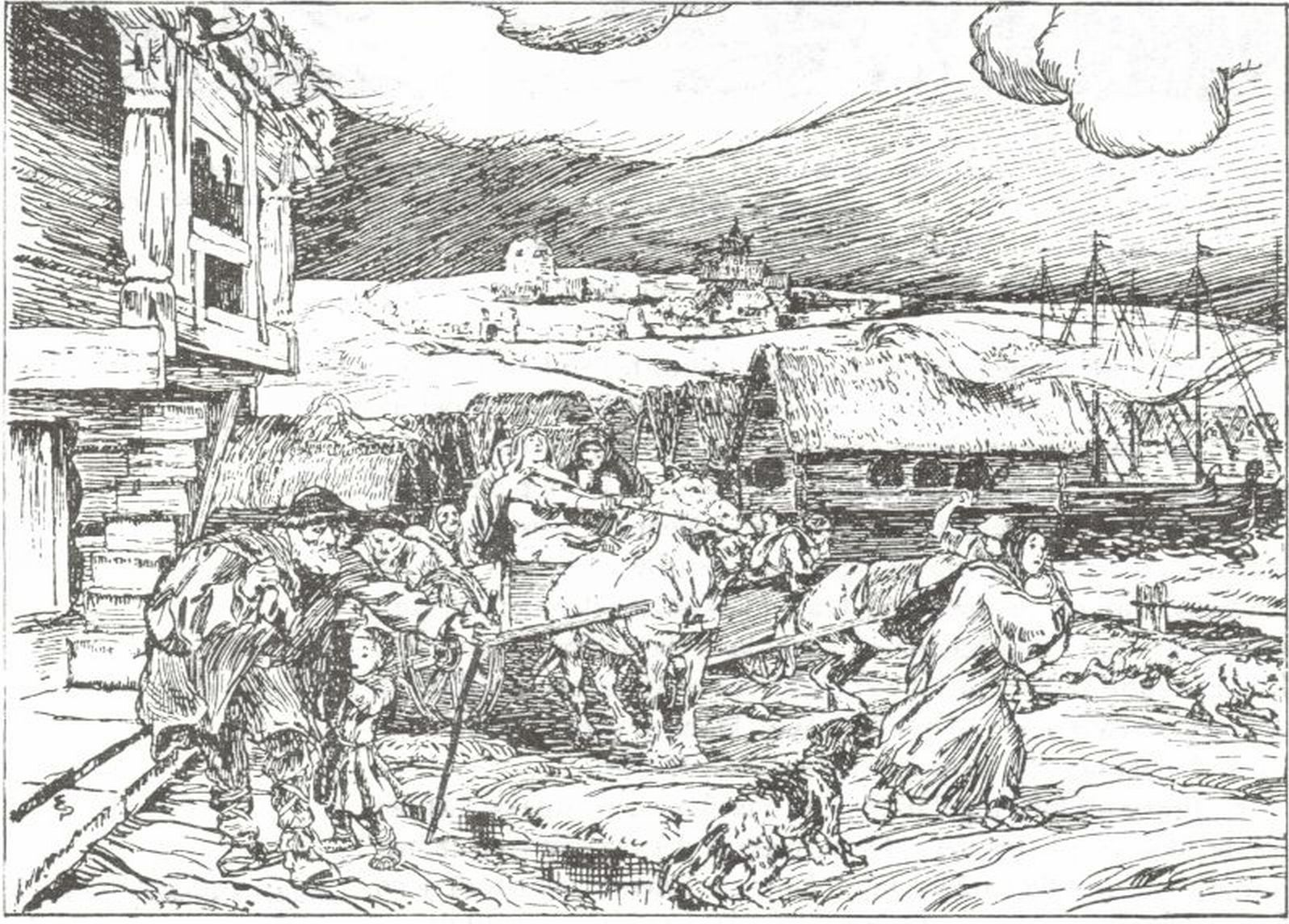 Eilif Peterssen: Illustration for Magnus Blindes og Harald Gilles saga, Heimskringla 1899-edition. nn: «Mange laga seg til å fare bort frå Konghelle.»